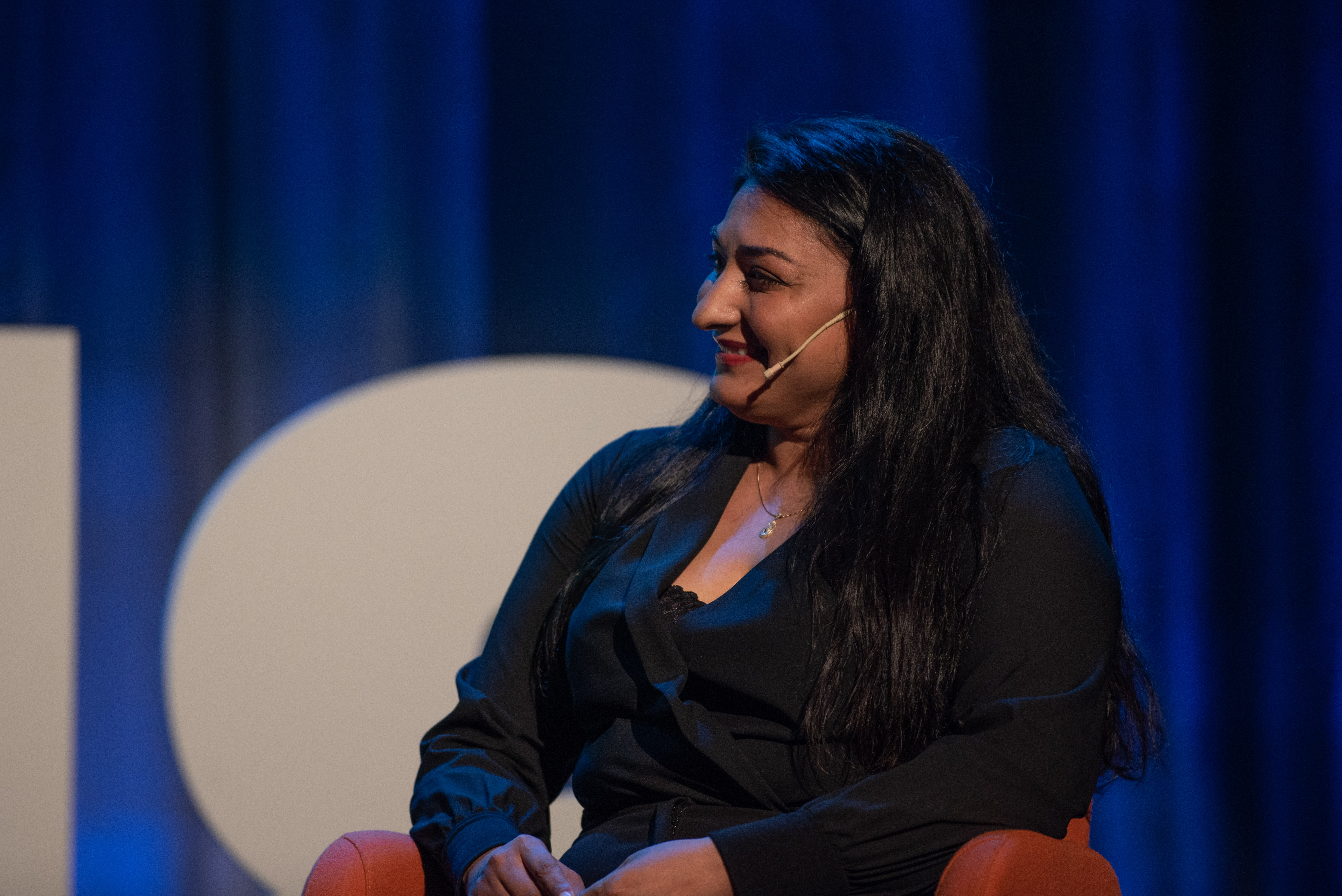 Frank Aarebrot-samtalen. Shabana Rehman Gaarder.